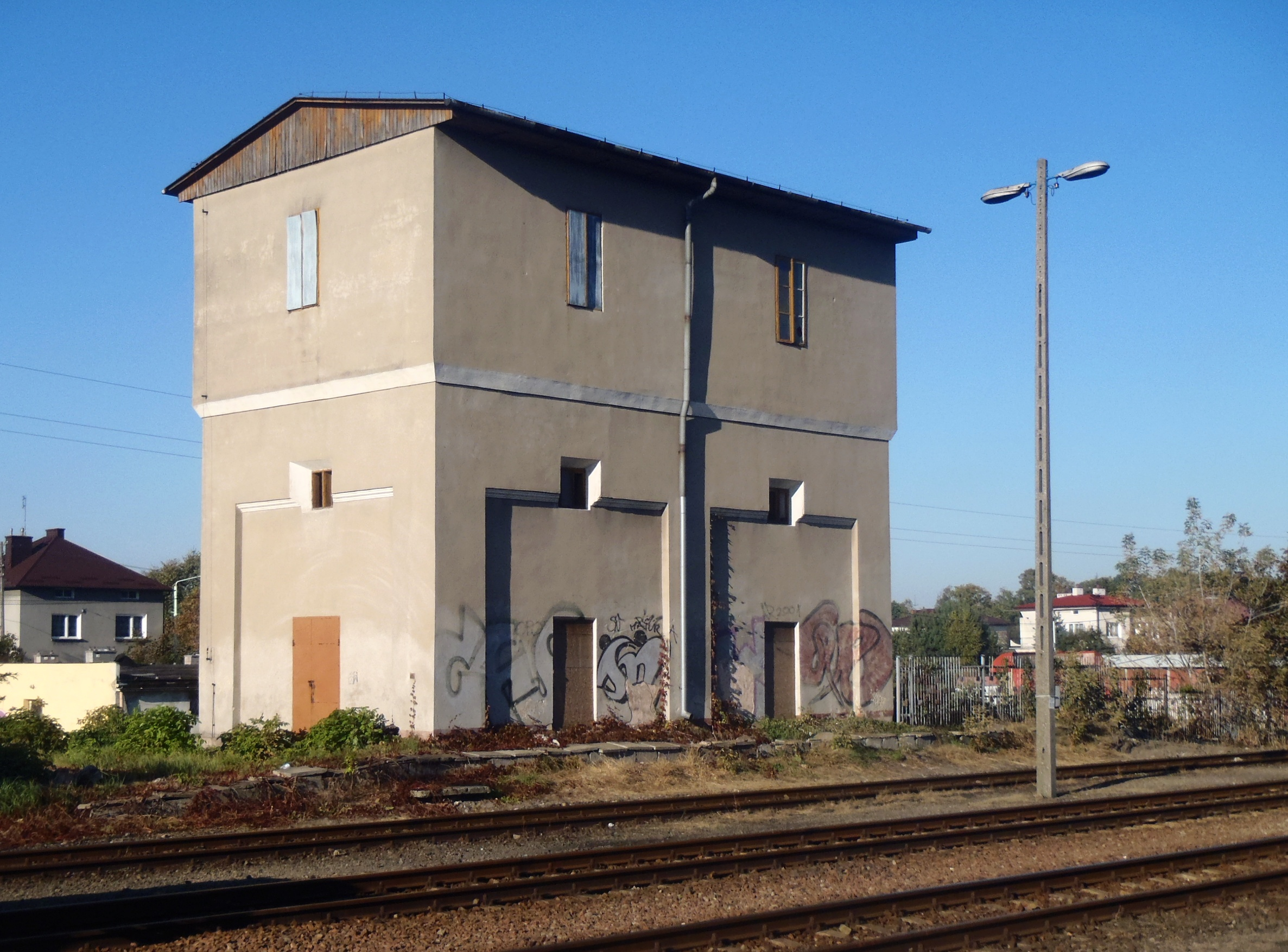 Wieża wodna na stacji kolejowej w Dębicy